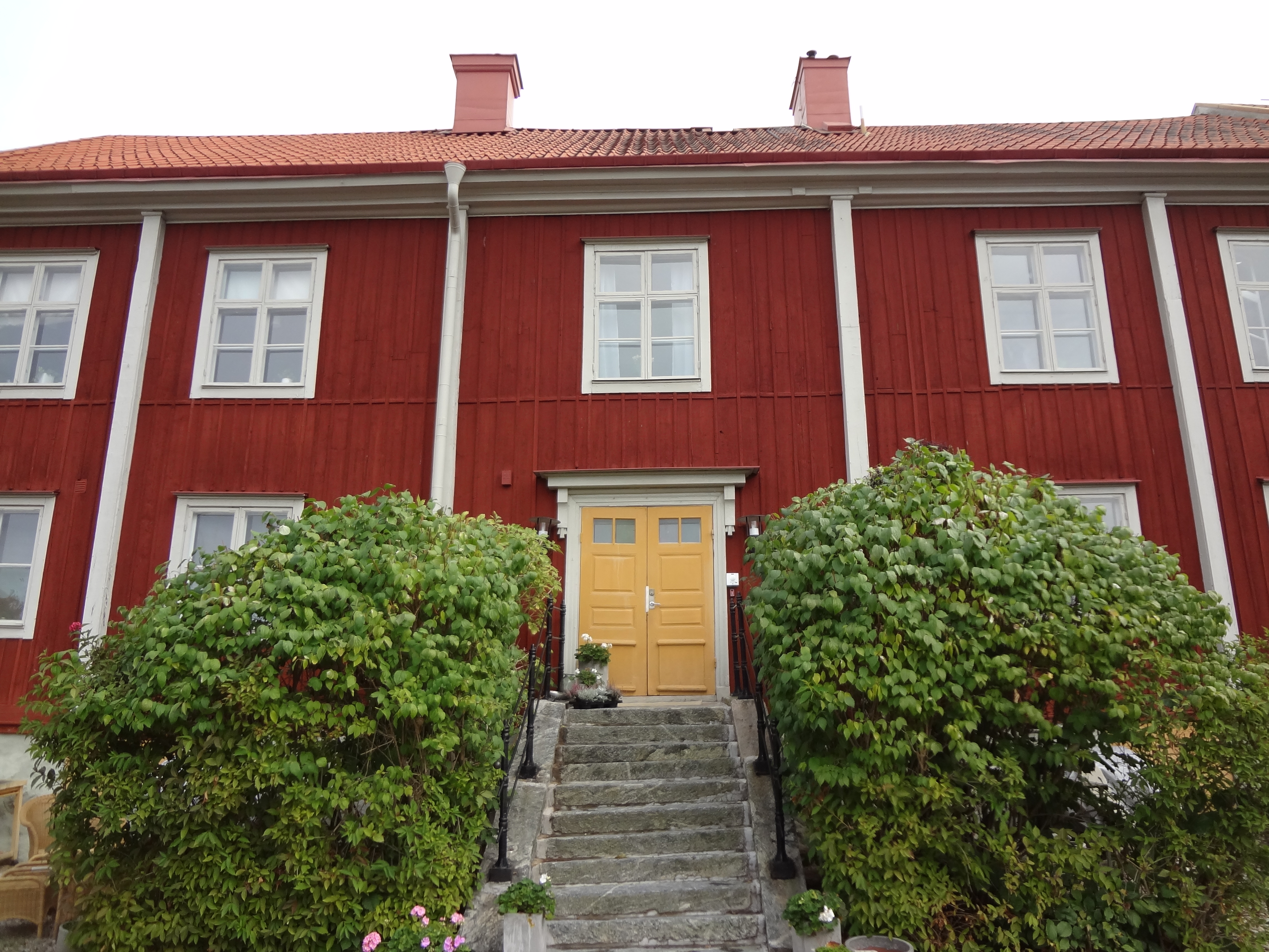 Öster- och Västerrekarne häraders tingshus (Stengeten 3 och 4)